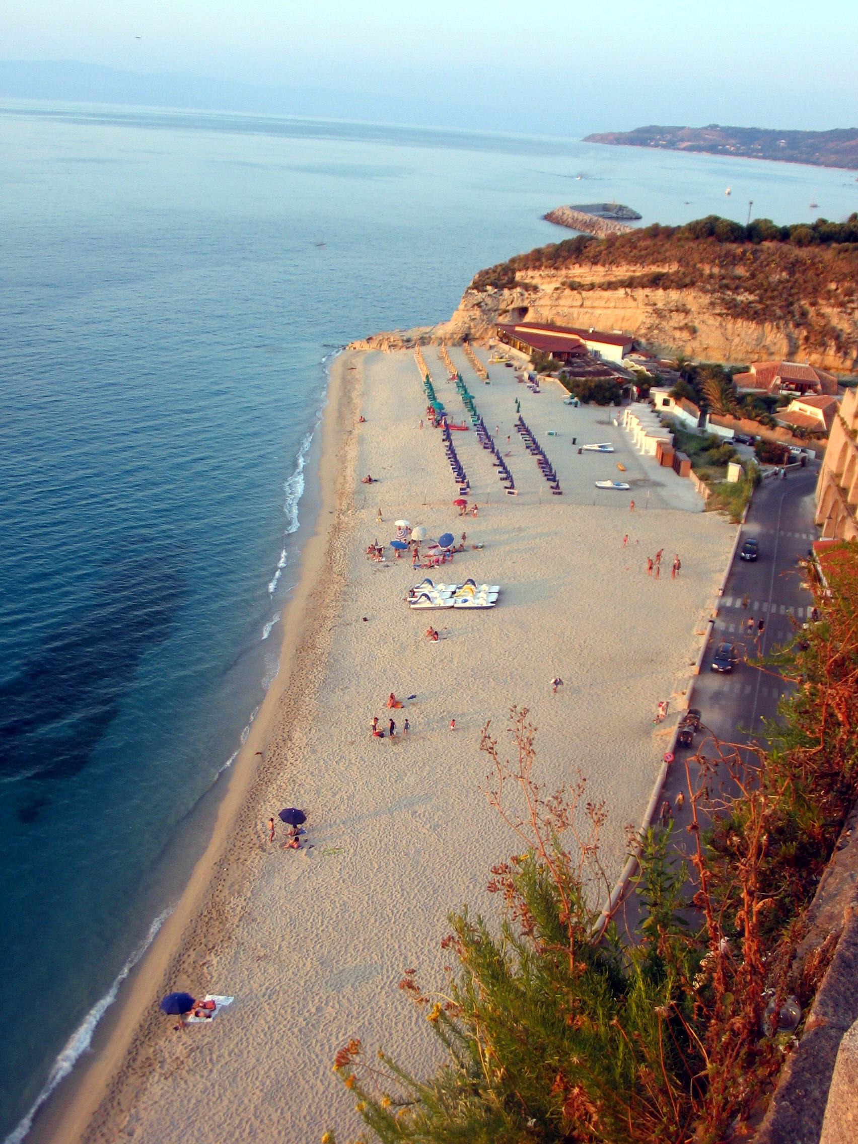 Tropea, Calabria, Italia